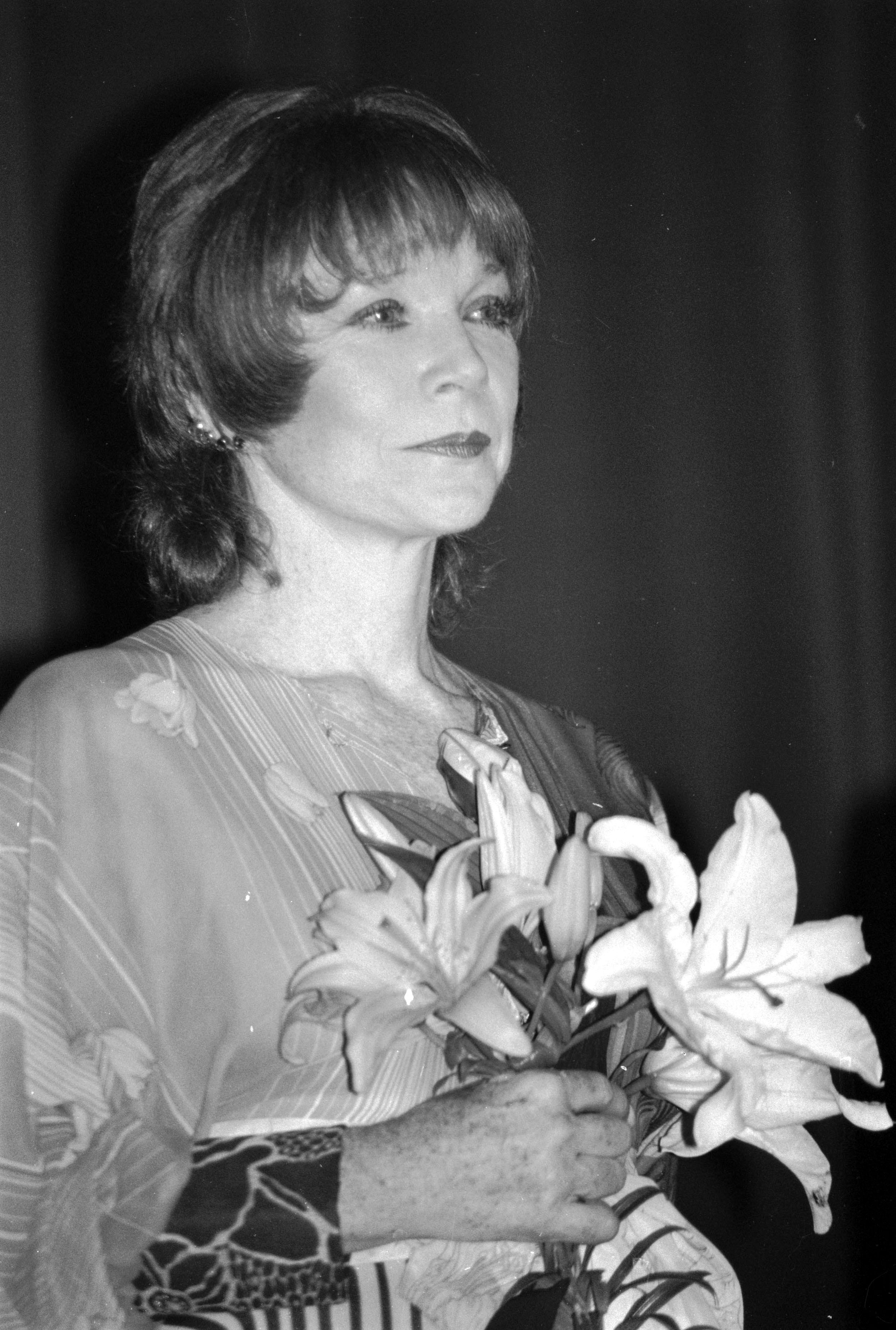 L'actrice américaine Shirley MacLaine au Festival du cinéma américain de Deauville (Normandie, France) en septembre 1987.